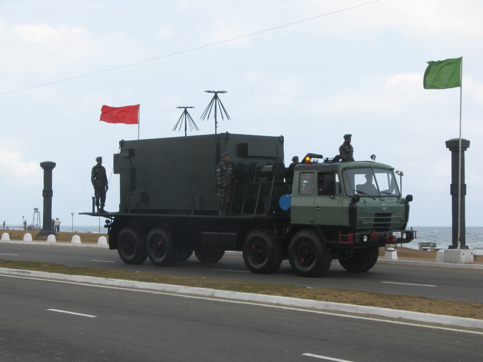 Indian Doppler Radar (INDRA-I) 2D Mobile Radar - Sri Lanka Airforce